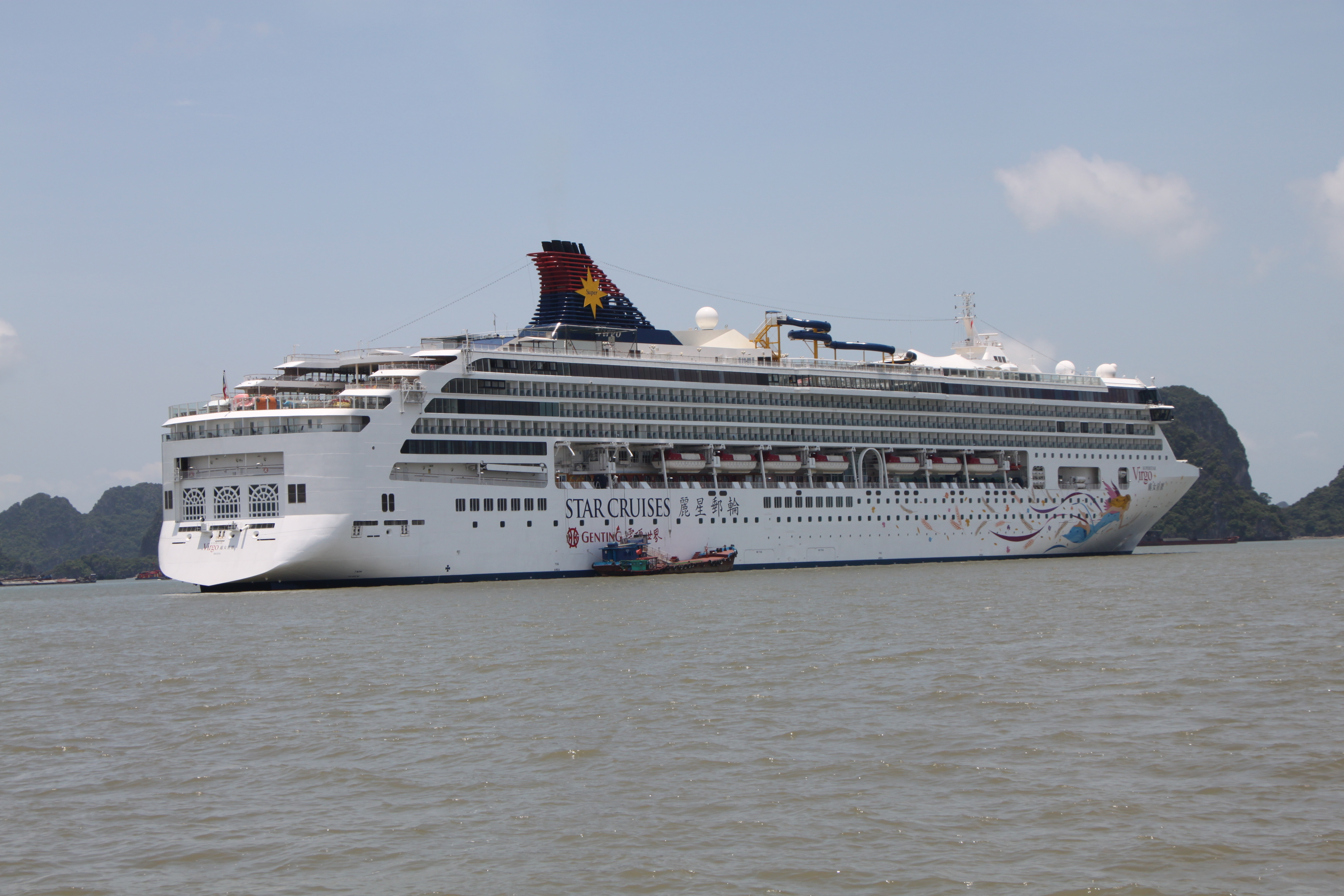 处女星号停泊在越南下龙湾